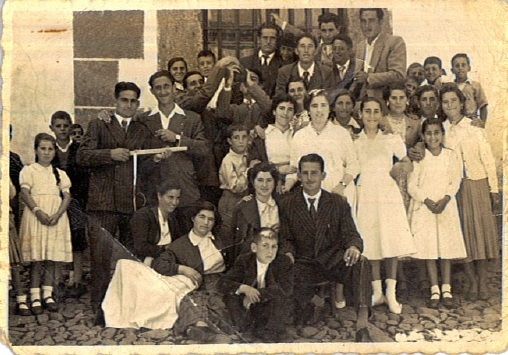 Juventud de Villafranca de la Sierra (Ávila, España) fotografiada en frente de una casa de la localidad en el año 1956.